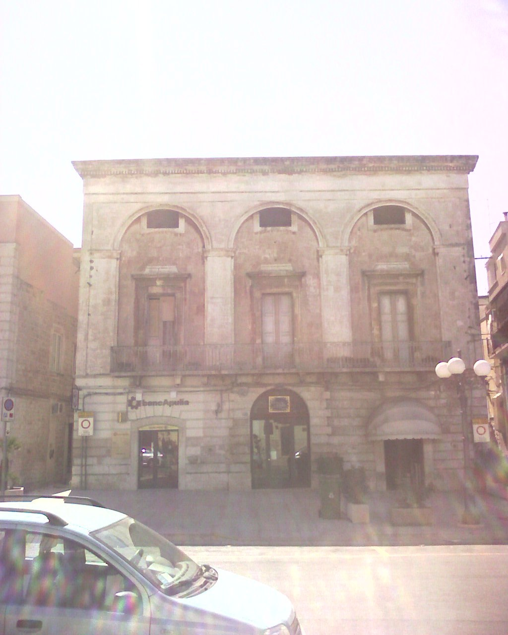 palazzo zanchi-giampaolo - Modugno (bari)-Italy